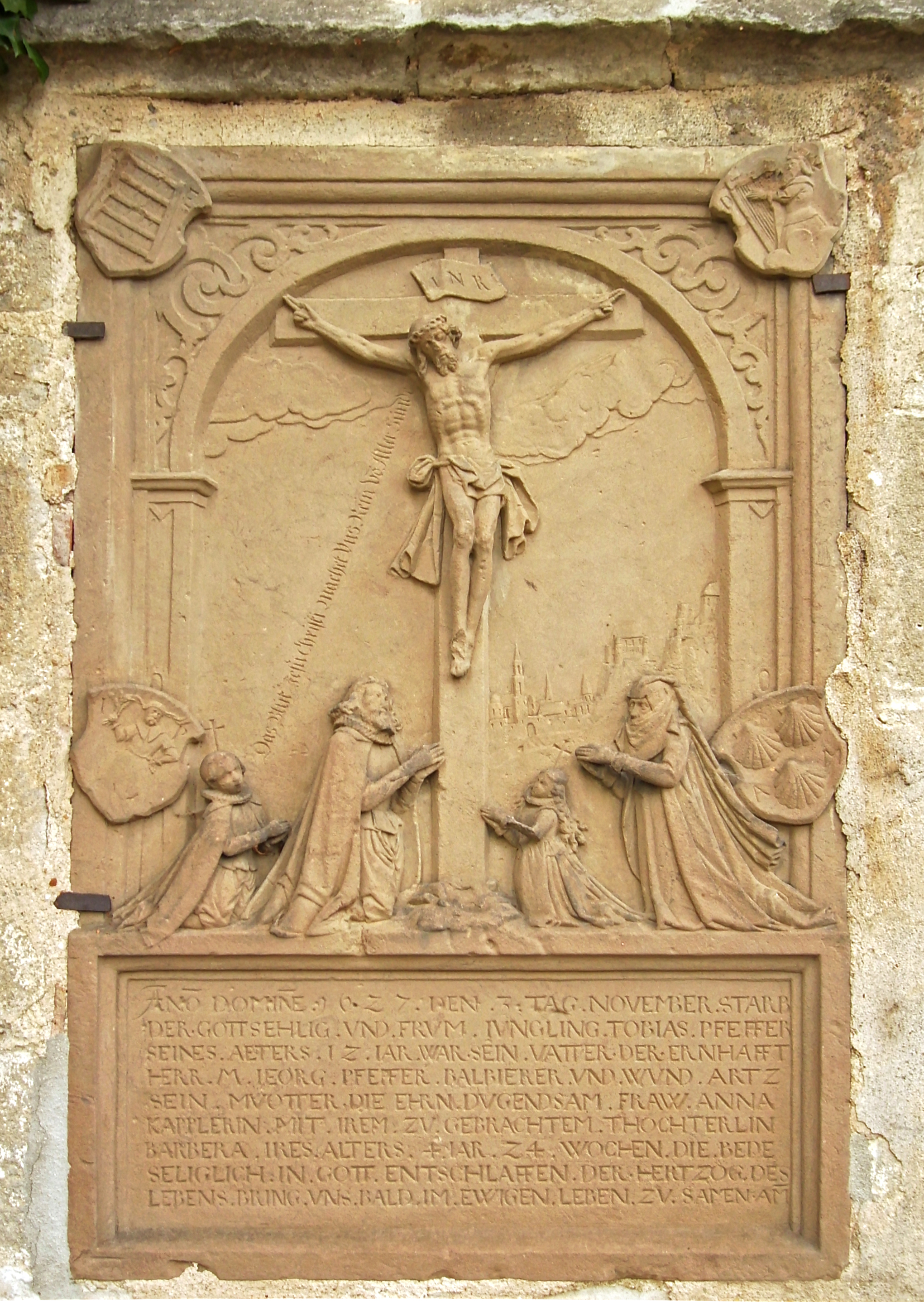 Balingen Epitaph der Familie Pfeffer vom Bildhauer Simon Schweitzer